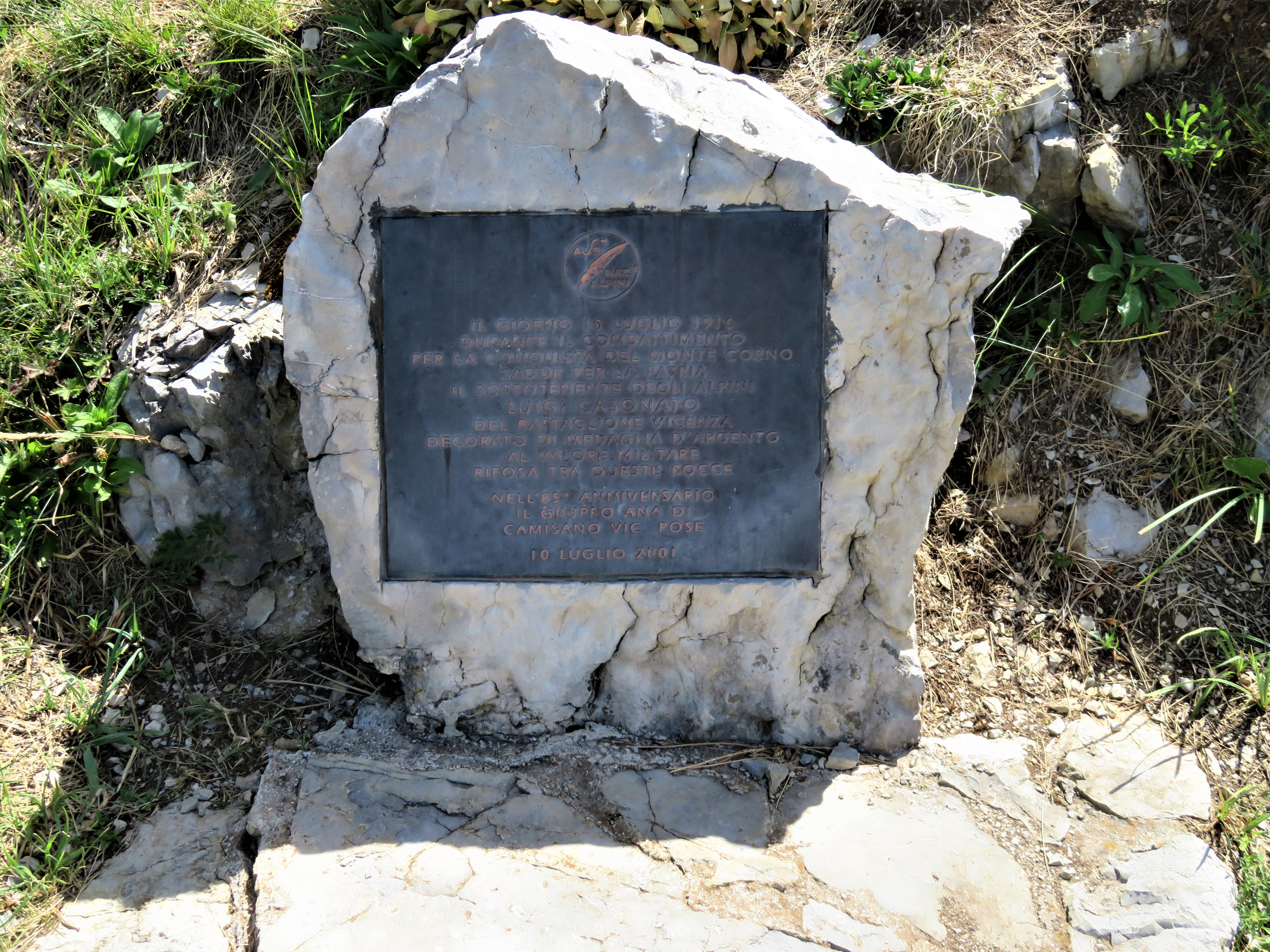 Selletta Battisti. Monumento a Luigi Casonato